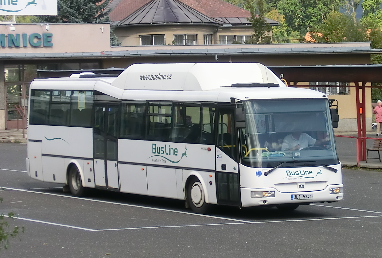 Autobus SOR CNG 12 společnosti BusLine na AN v Jilemnici